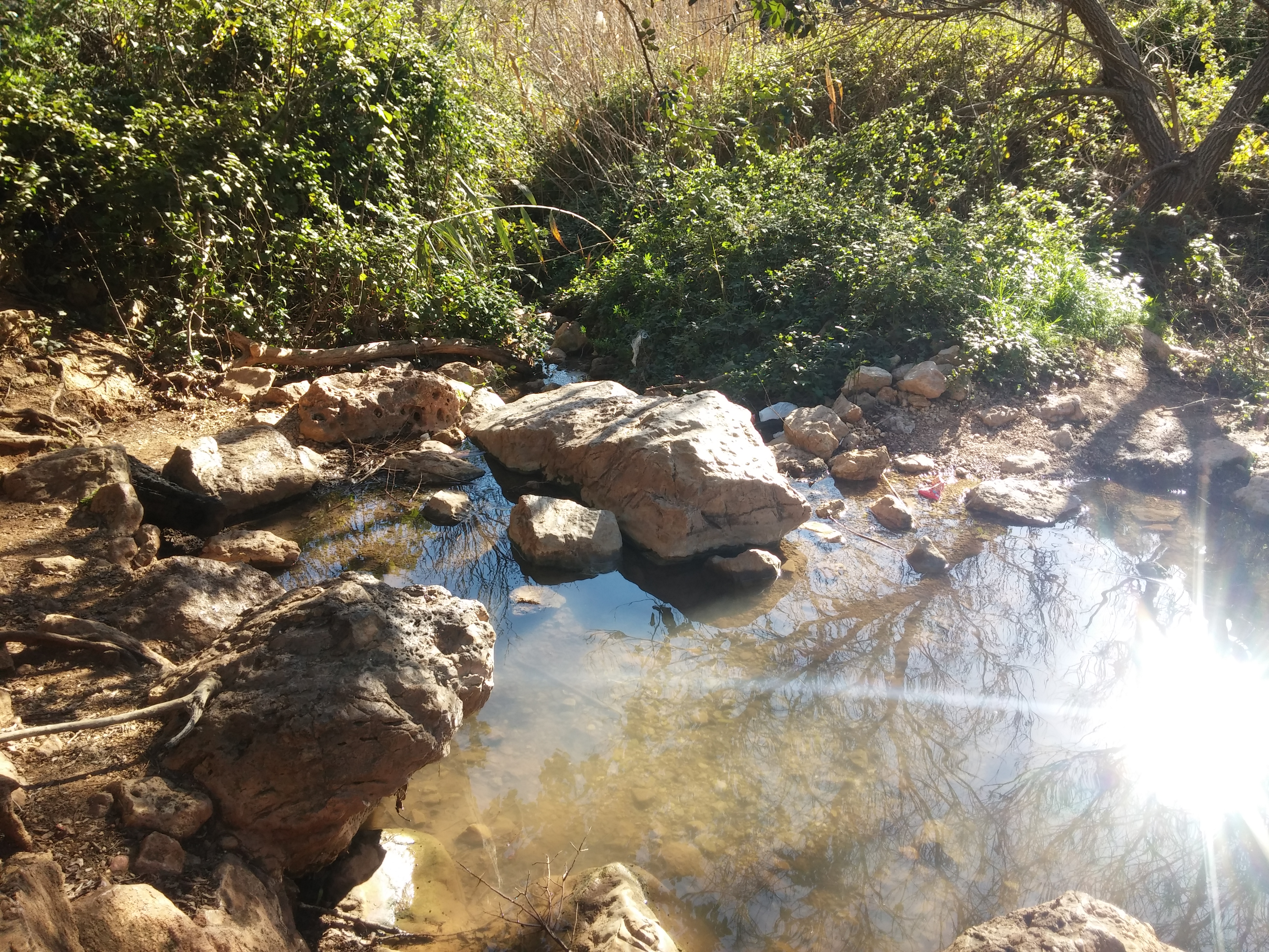 גן לאומי נחל צלמון, טחנות קמח, מים זורמים. Tzalmon Valley, Israel